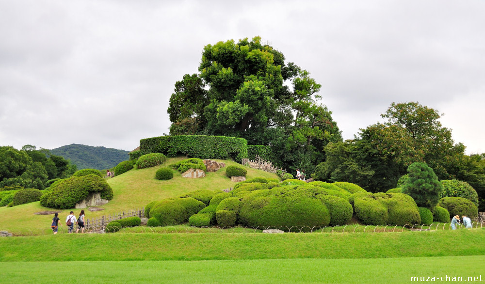 jardin